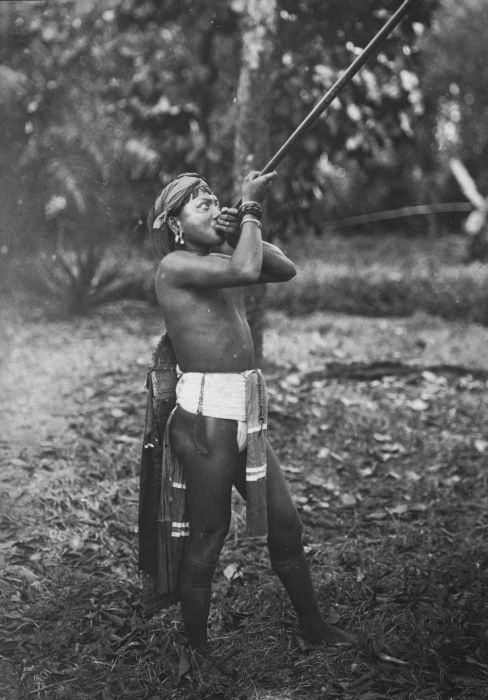 Foto. Dajak met blaasroer